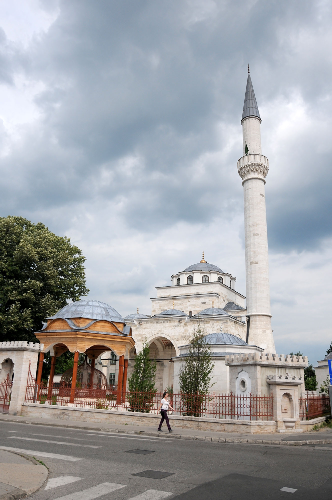 Dzamija ferhadija Banja Luka This image was uploaded as part of Trace of Soul 2015.